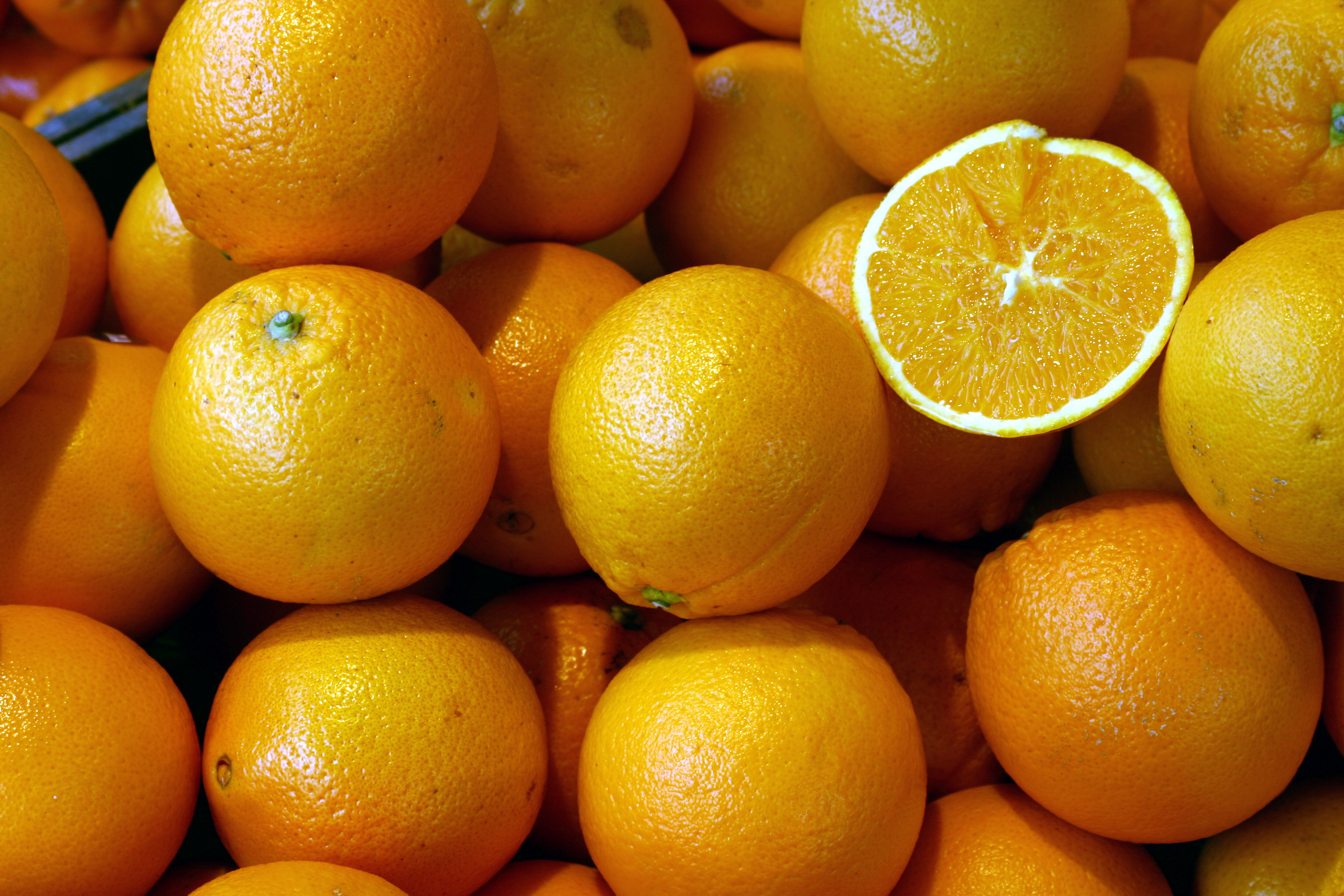 Orangen